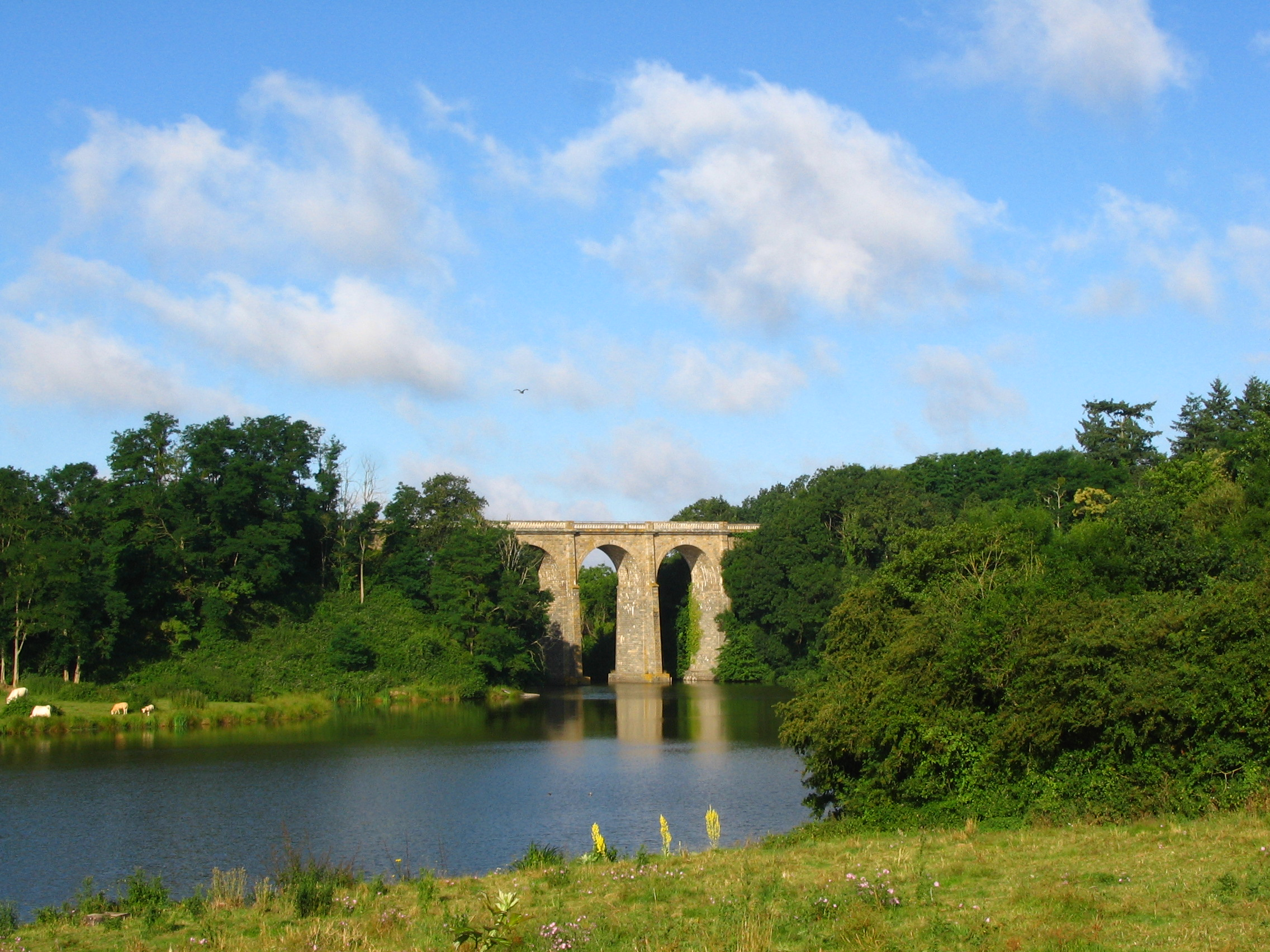 Extrémité nord-est du lac de Ribou (Maine-et-Loire), viaduc de l'ancienne ligne Cholet-Bressuire.